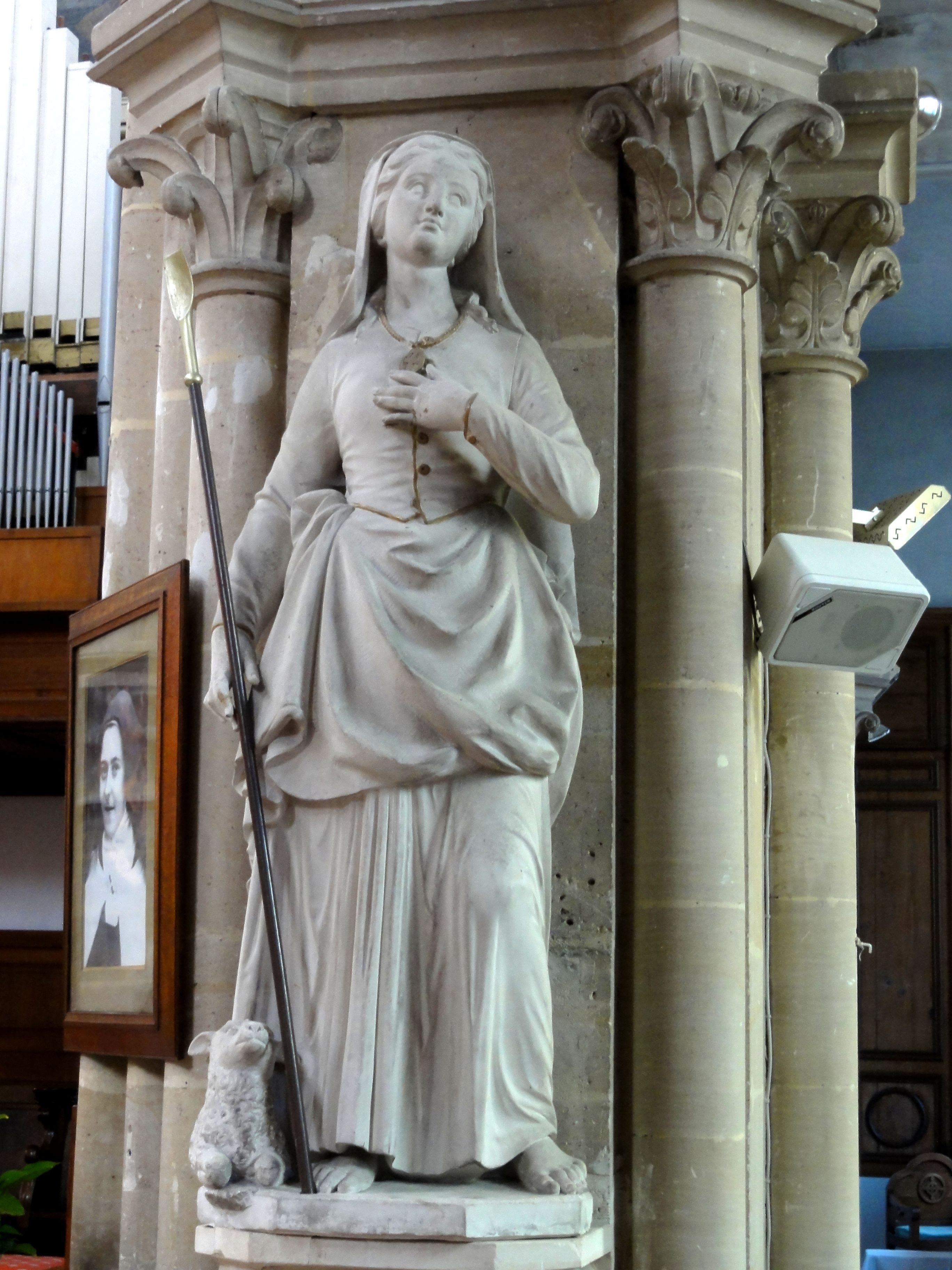 Statue de sainte Geneviève en bergère, en pierre, offerte à l'église en 1862.